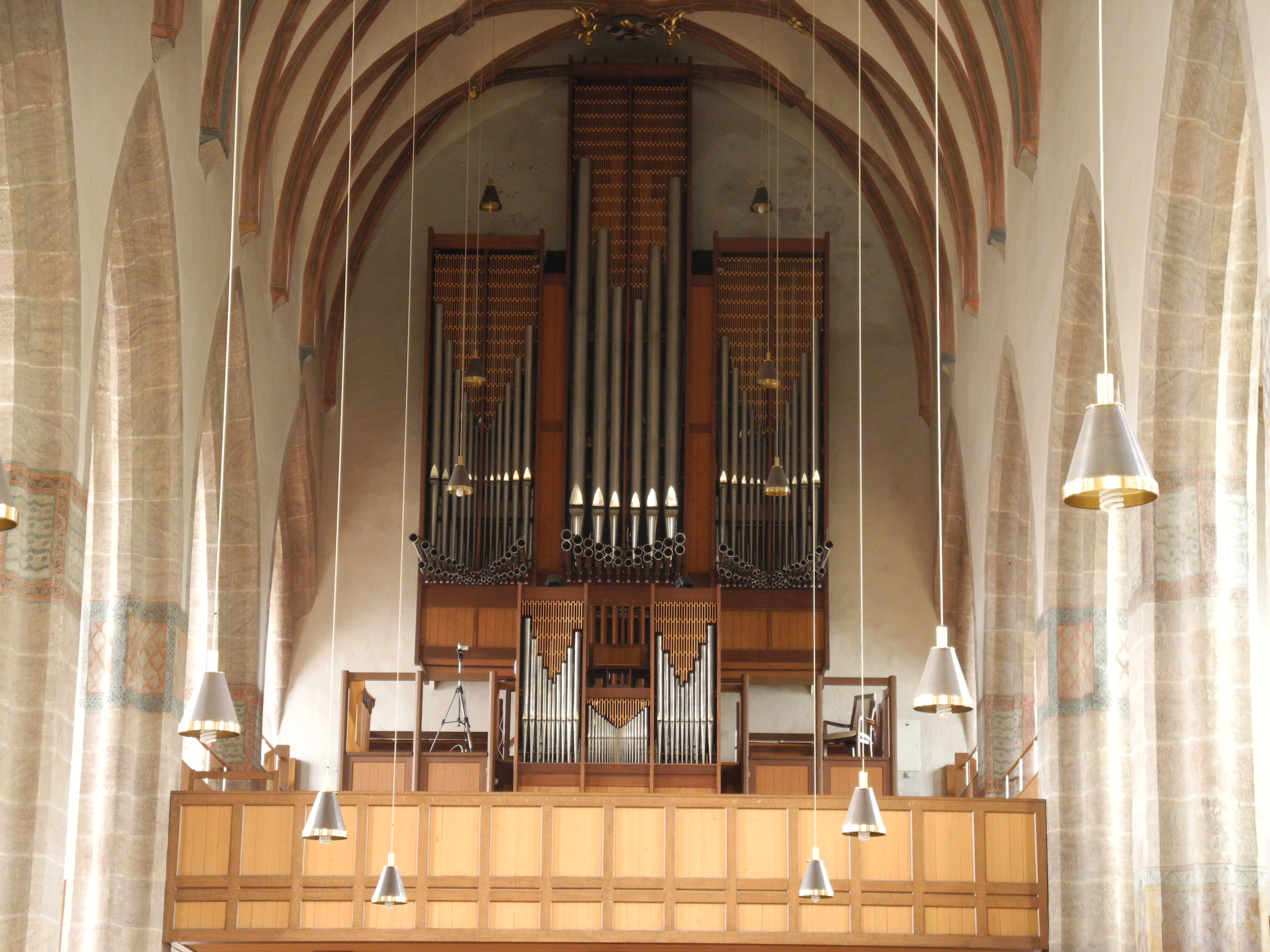 1964 Rieger (III/P/43), ren. 2001 Mühleisen